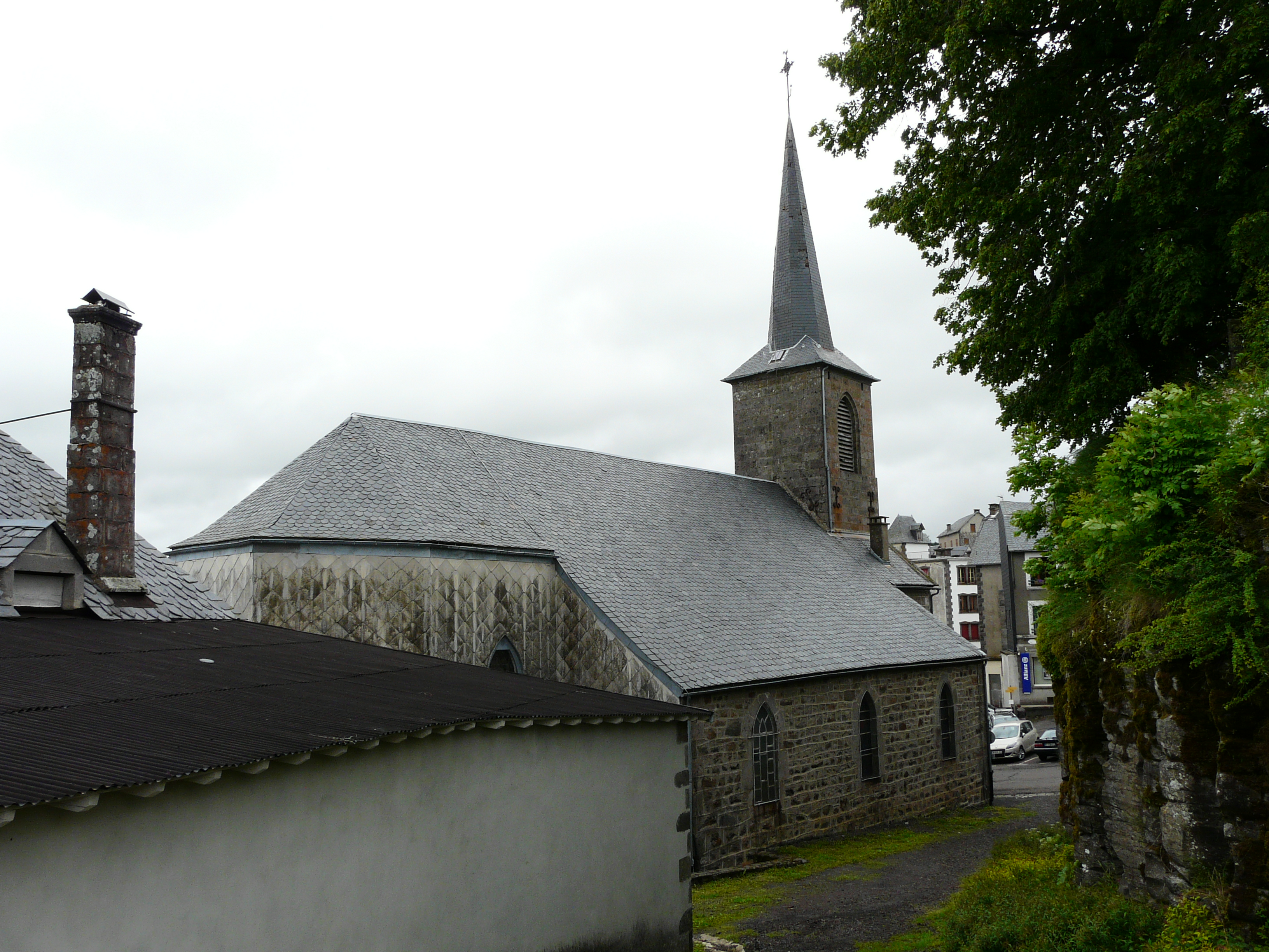 L'église Saint-Louis de La Tour-d'Auvergne, Puy-de-Dôme, France.